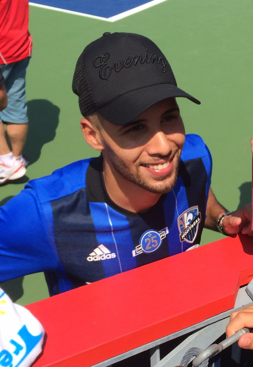 Saphir Taider Impact de Montréal